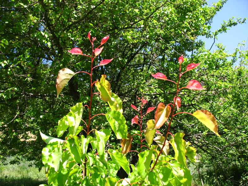 سرمشک